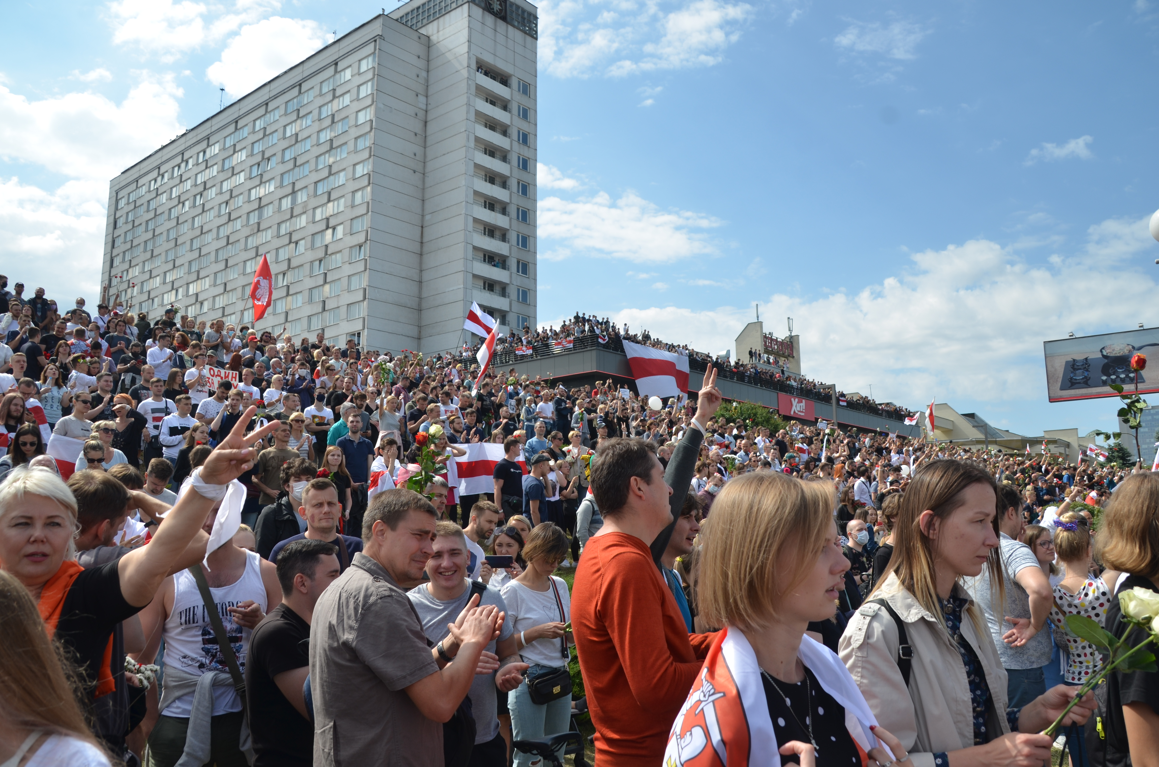 Митинг памяти Александра Тарайковского, метро Пушкинская, Минск, 15 августа 2020